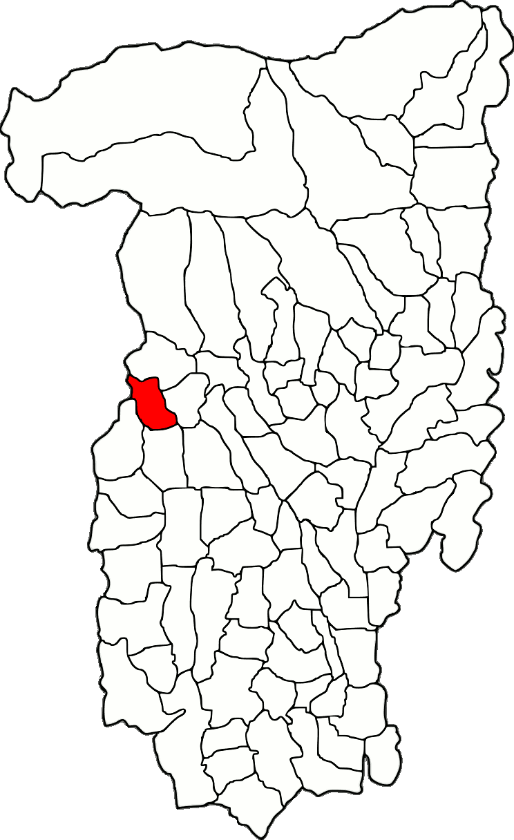 Lage der Gemeinde Mateești im Kreis Vâlcea (RO).